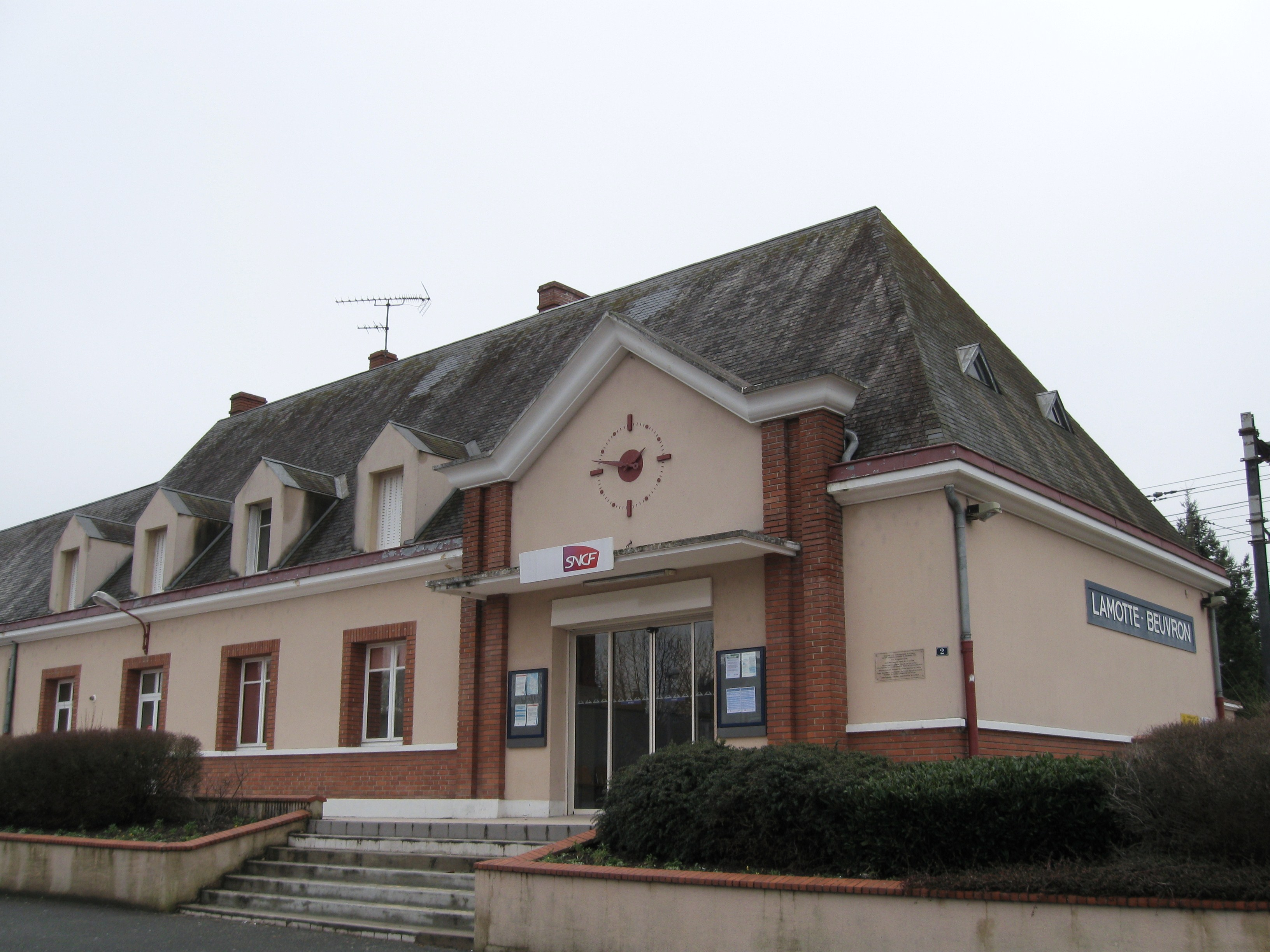 Gare de Lamotte-Beuvron, Loir-et-Cher, France